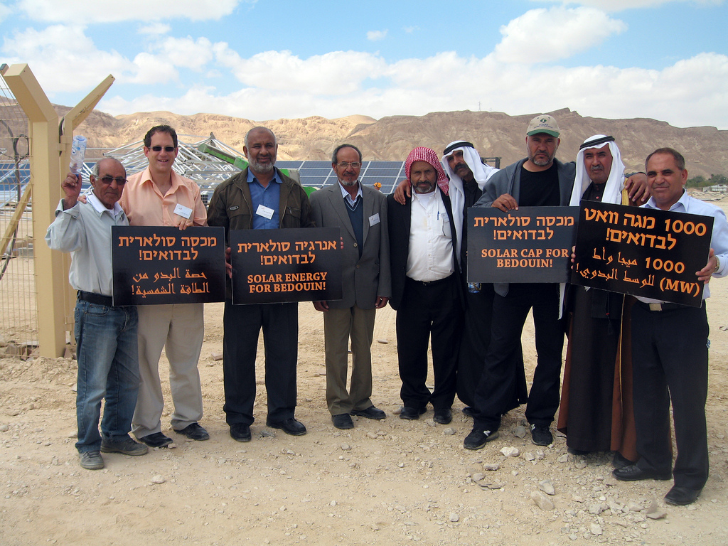 תראבין - פרויקט סולארי בקהילה הבדואית.